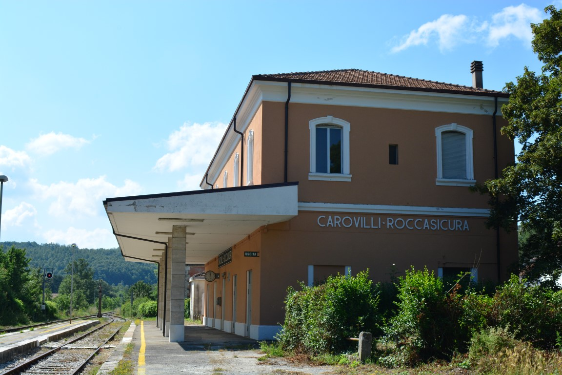 Stazione Ferroviaria This is a photo of a monument which is part of cultural heritage of Italy.